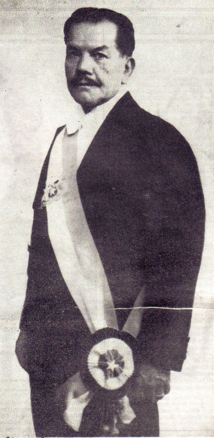 Pedro Avelino Aguirre Cerda (*6 de febrero de 1879 — †25 de noviembre de 1941), político, abogado y educador chileno, Presidente de Chile entre 1938 y 1941, año en que falleció. Militante del partido radical, bajo su gobierno dio gran impulso a la educación, bajo el lema “gobernar es educar”. Popularmente se le conocía como "Don Tinto", por su vinculación a la industria vitivinícola.